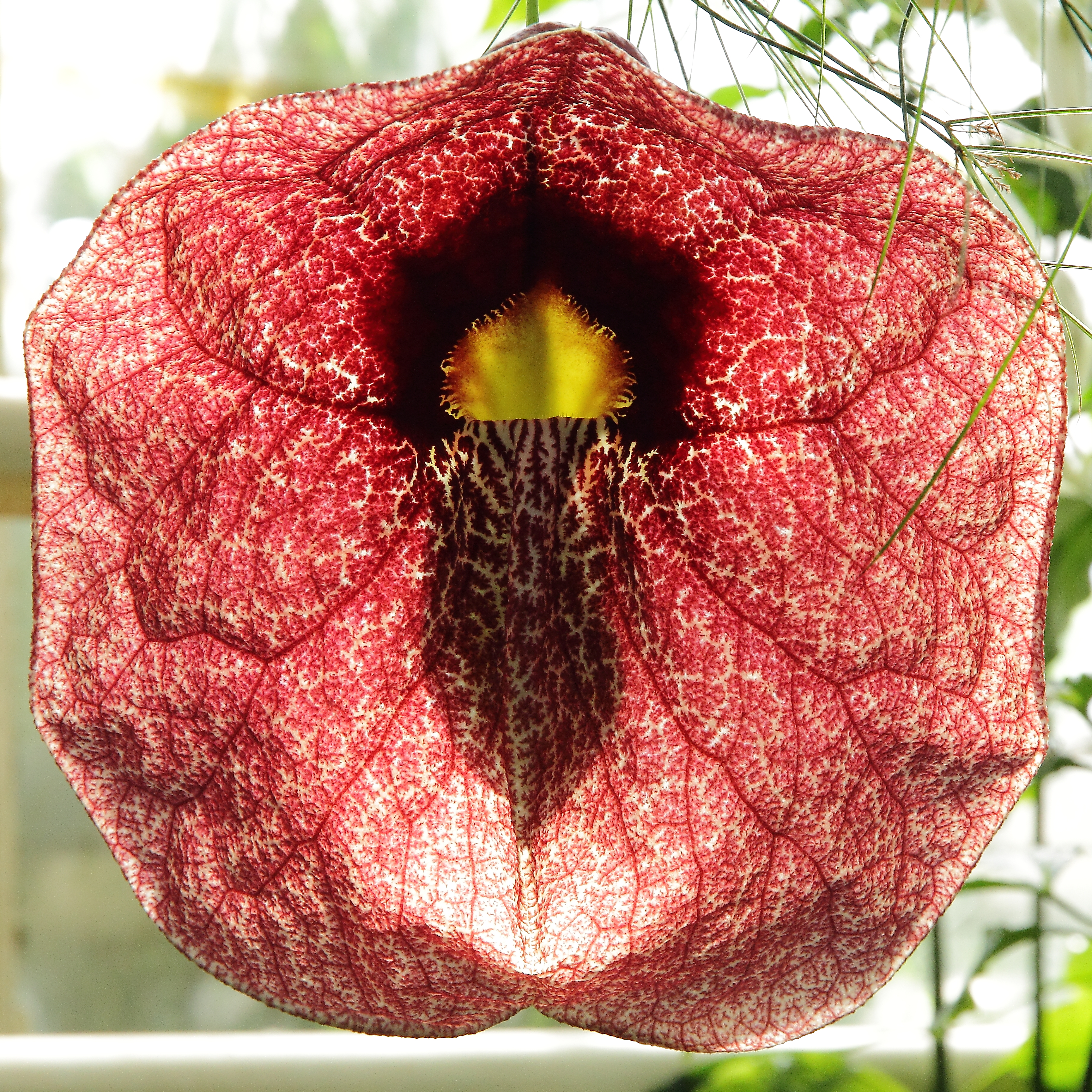 Aristolochia gigantea i Göteborgs Botaniska Trädgård.